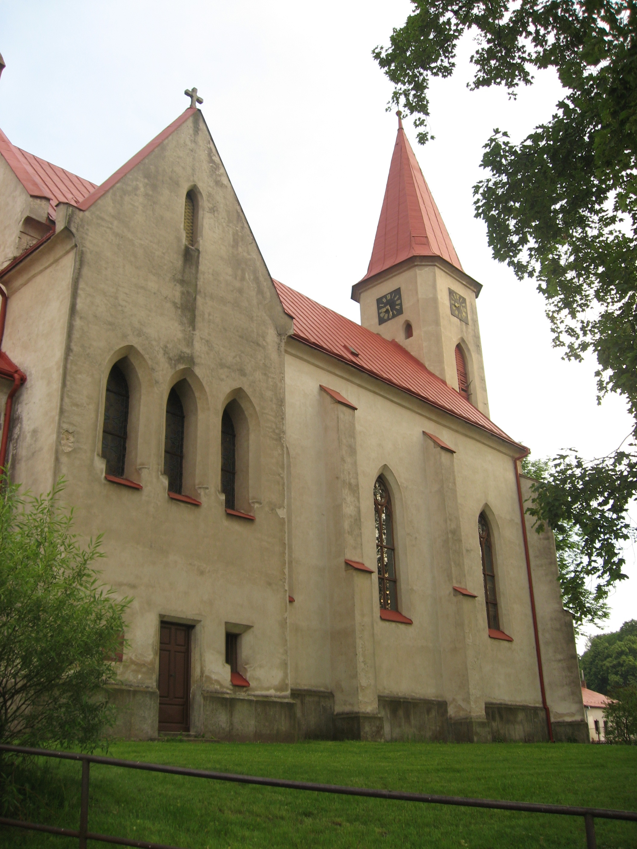 Herálec, okres Havlíčkův Brod - kostel sv. Bartoloměje